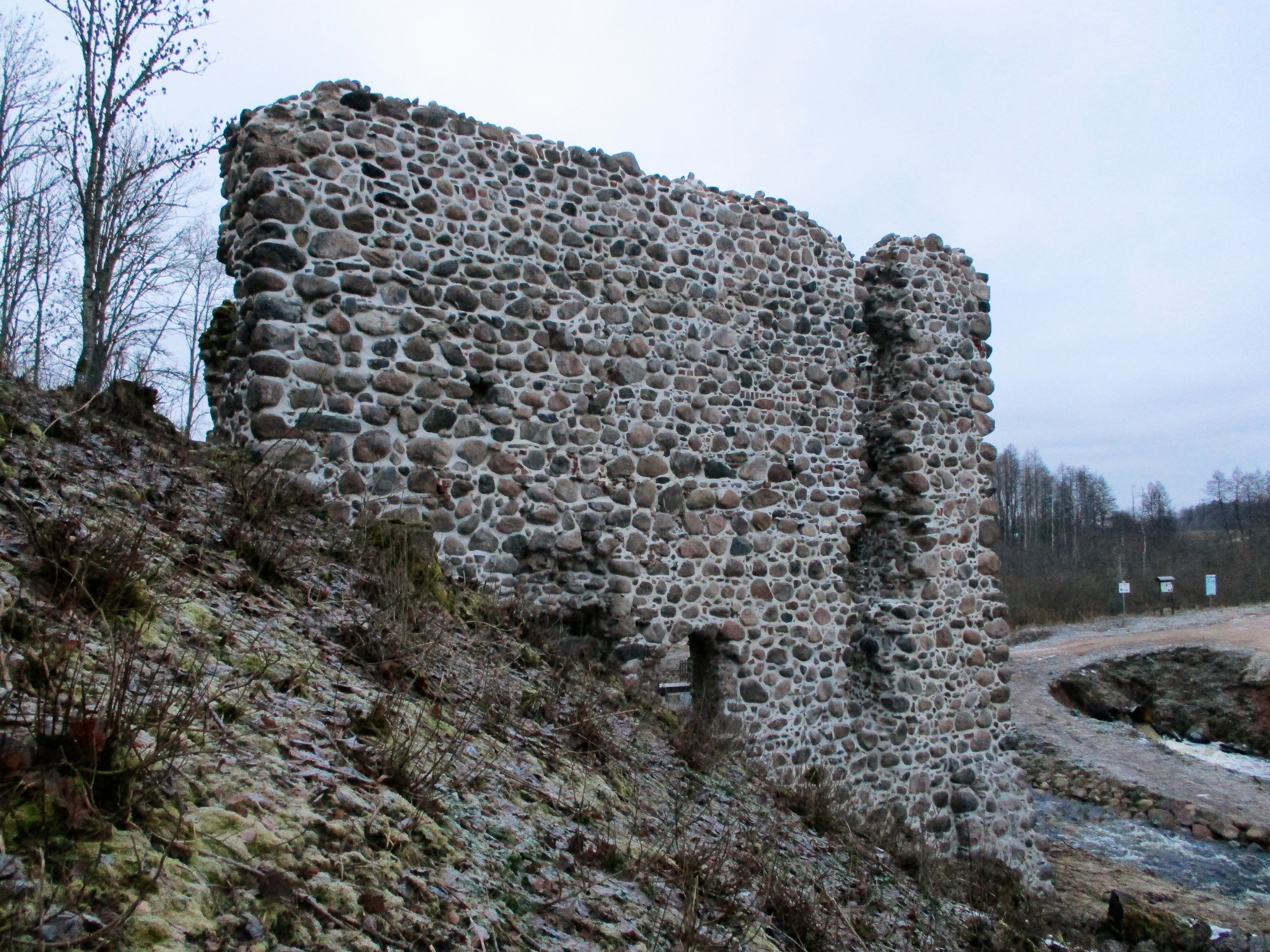 Pealinnuse danskeri renoveeritud idamüür kagust. Asub u. 1,2 km Tarvastu luteri kirikust kirdes Tarvastu jõe ääres vanal kõrgel jõesaarel. Linnuse juurde pääseb keerates kirikust põhja pool Väluste peale ja seal esimesest teeristist paremale